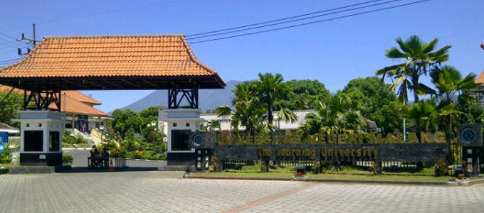 gerbang UM jlan semarang